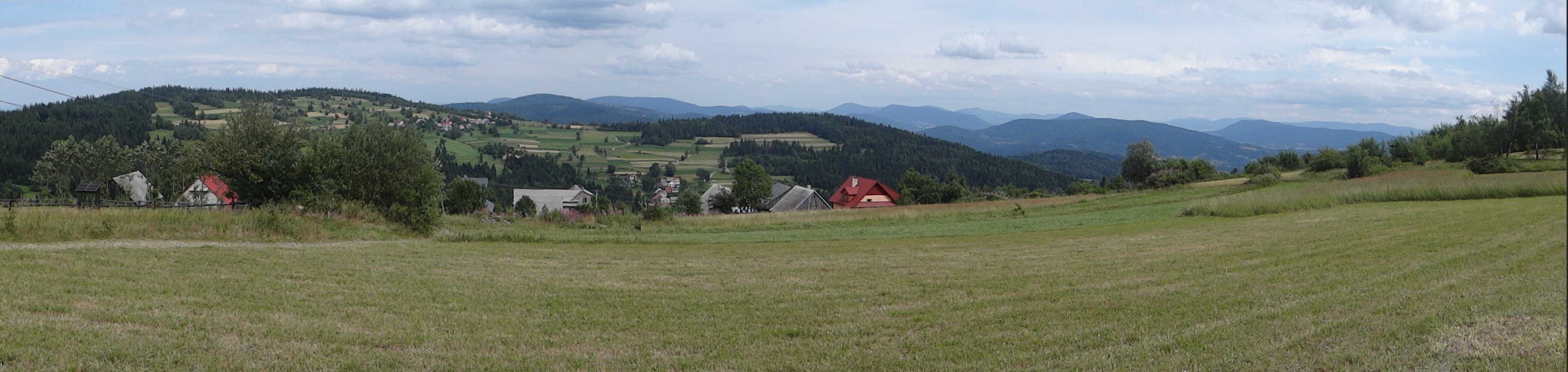 Miejscowość Bogdanówka. Panorama z przełęczy między Praszywką i Koskową Górą